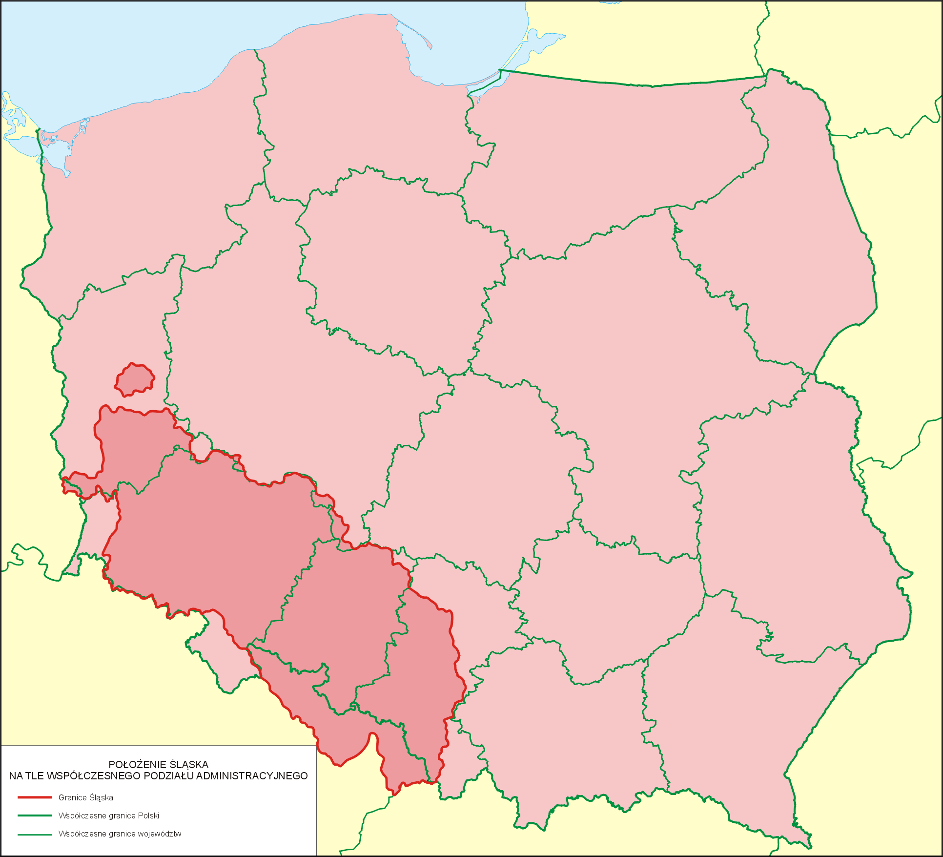 Położenie Śląska na tle współczesnego podziału administracyjnego